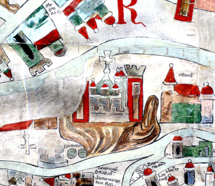 Ausschnitt der berühmten Ebstorfer Weltkarte von 1300. Zu sehen ist dort Aachen. Rechts daneben ist Verdun und links daneben die Reste von Köln dargestellt.